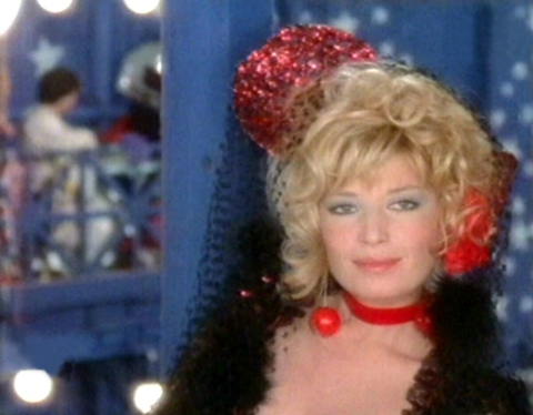 Képkocka az „Éjfélkor indul útjára a gyönyör” című filmből